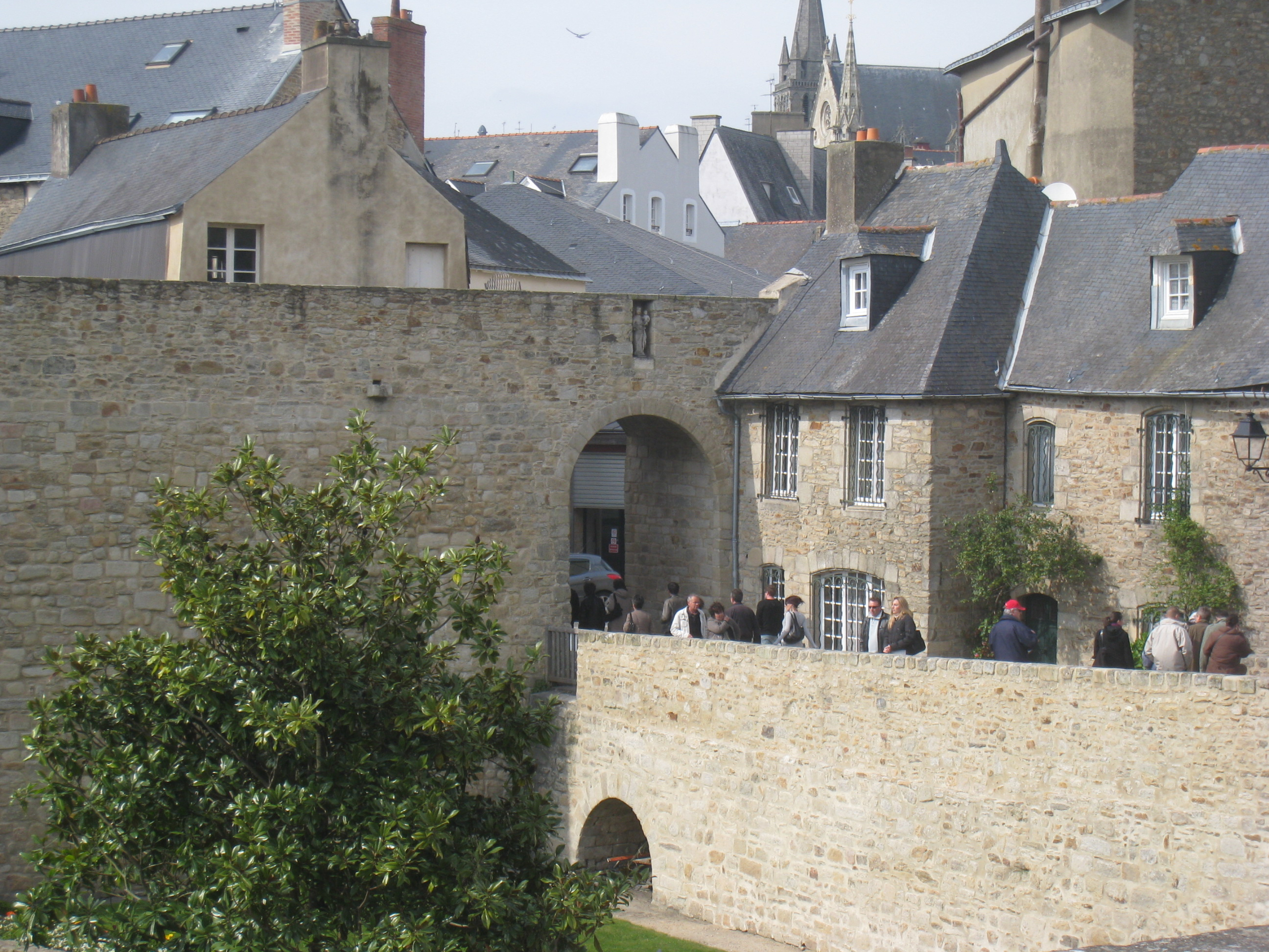 Porte Poterne de Vannes en 2010.